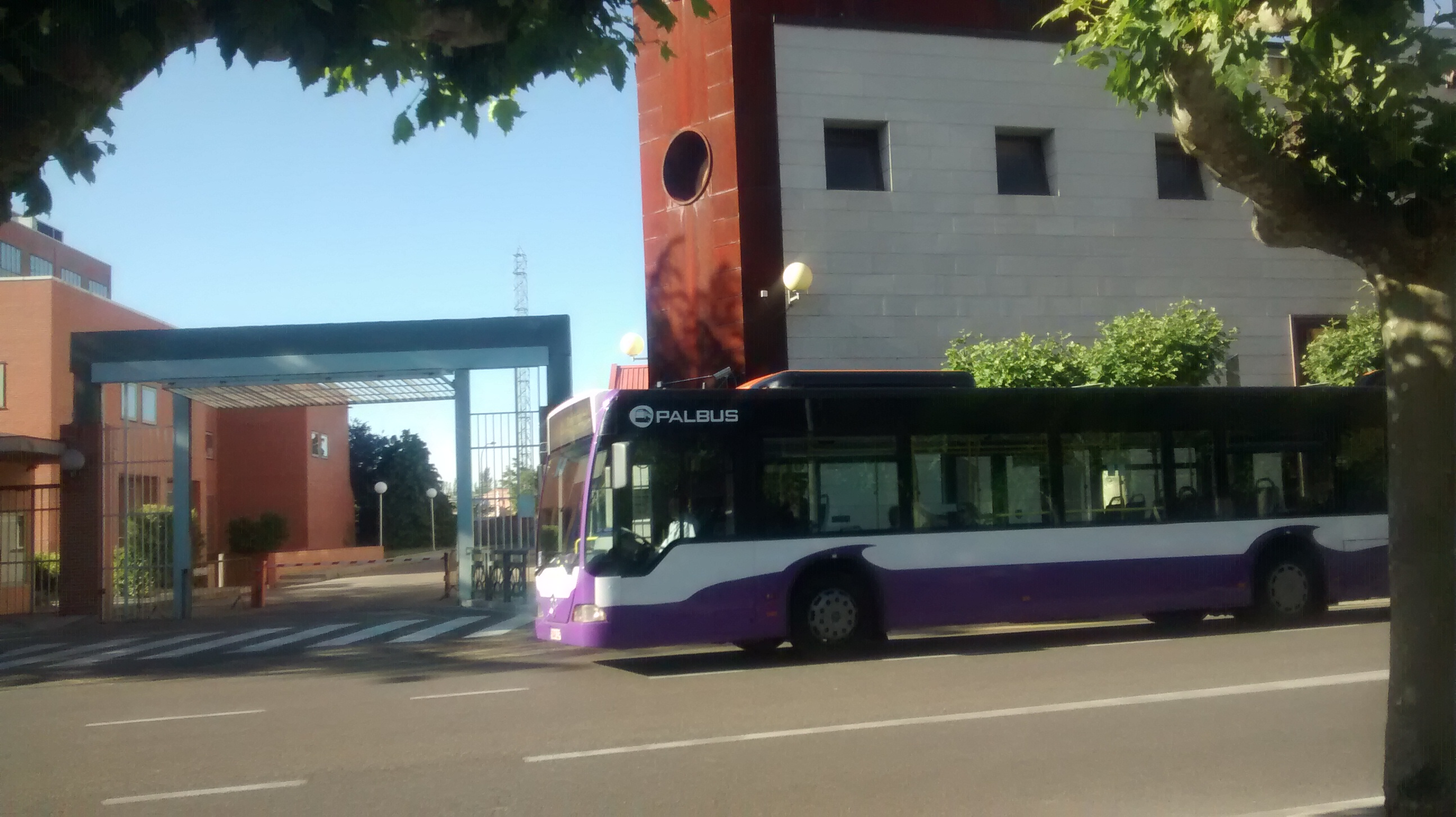 Autobús de la línea 1 cerca de San Antonio